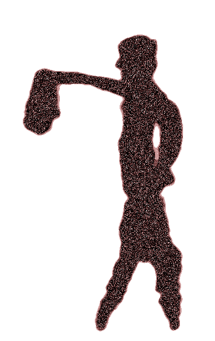 Arte esquemático ibérico: Herramientas, azada, Abrigo de Tajos de Barcinete